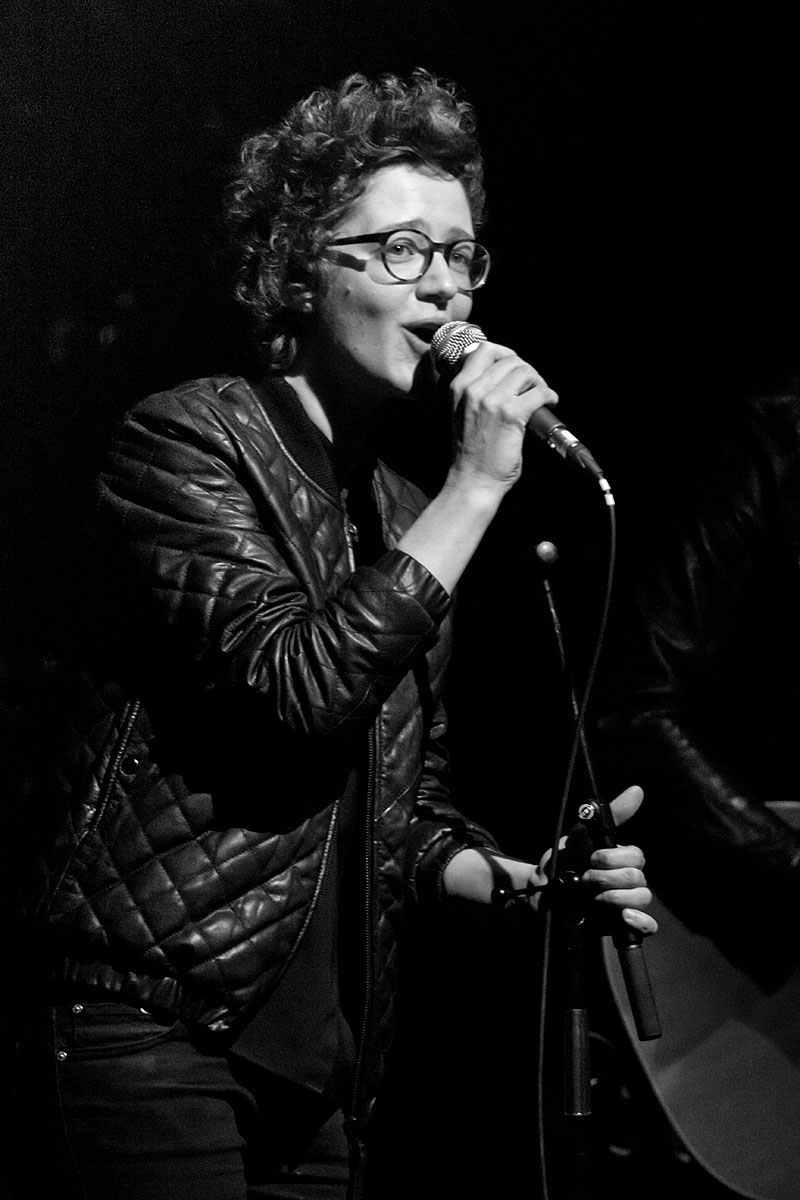 Sanger og sangskriver Marie Key på Bremen Teater 12. januar 2013